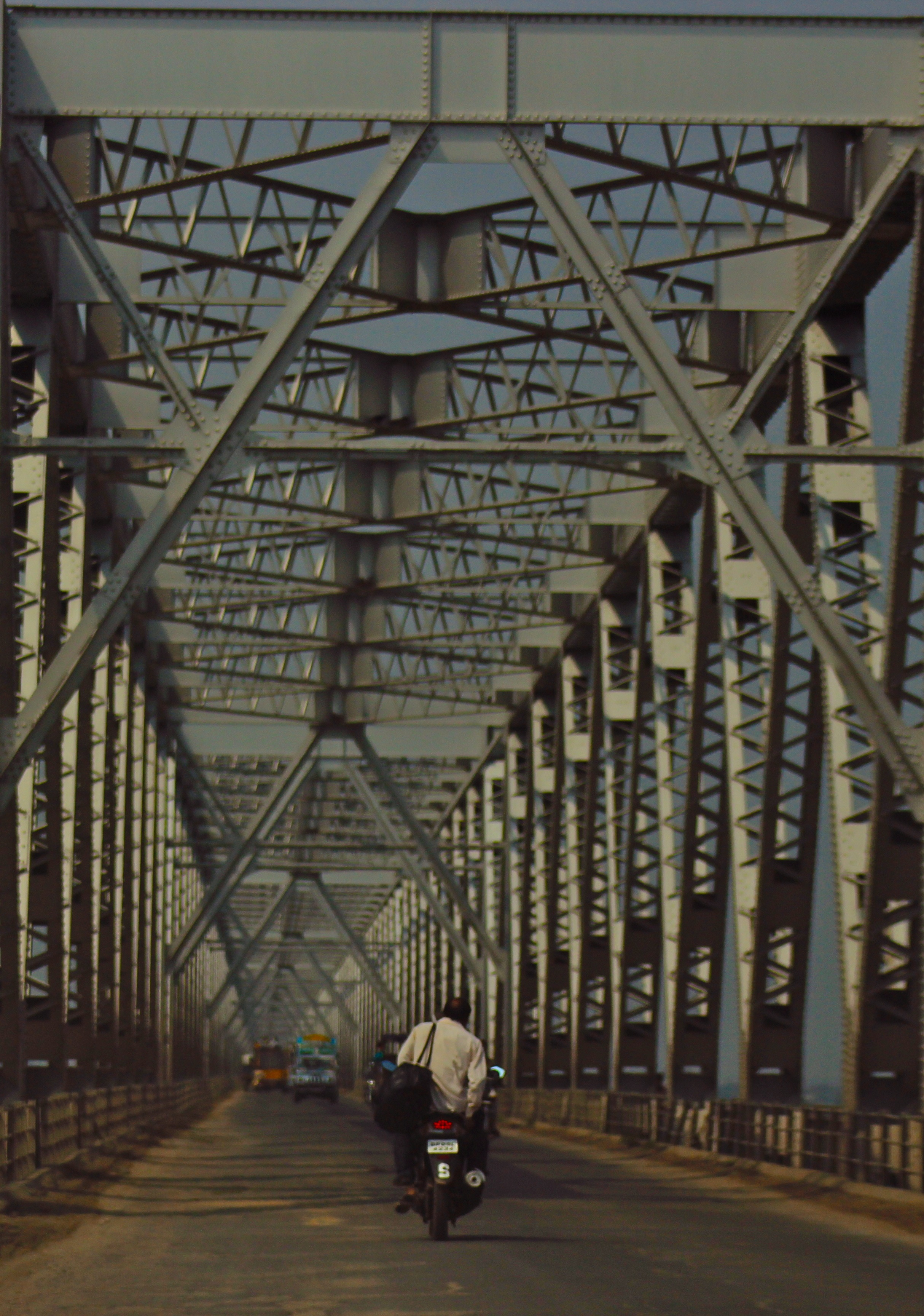 Rajendra Bridge over River Ganga in Begusarai, Bihar